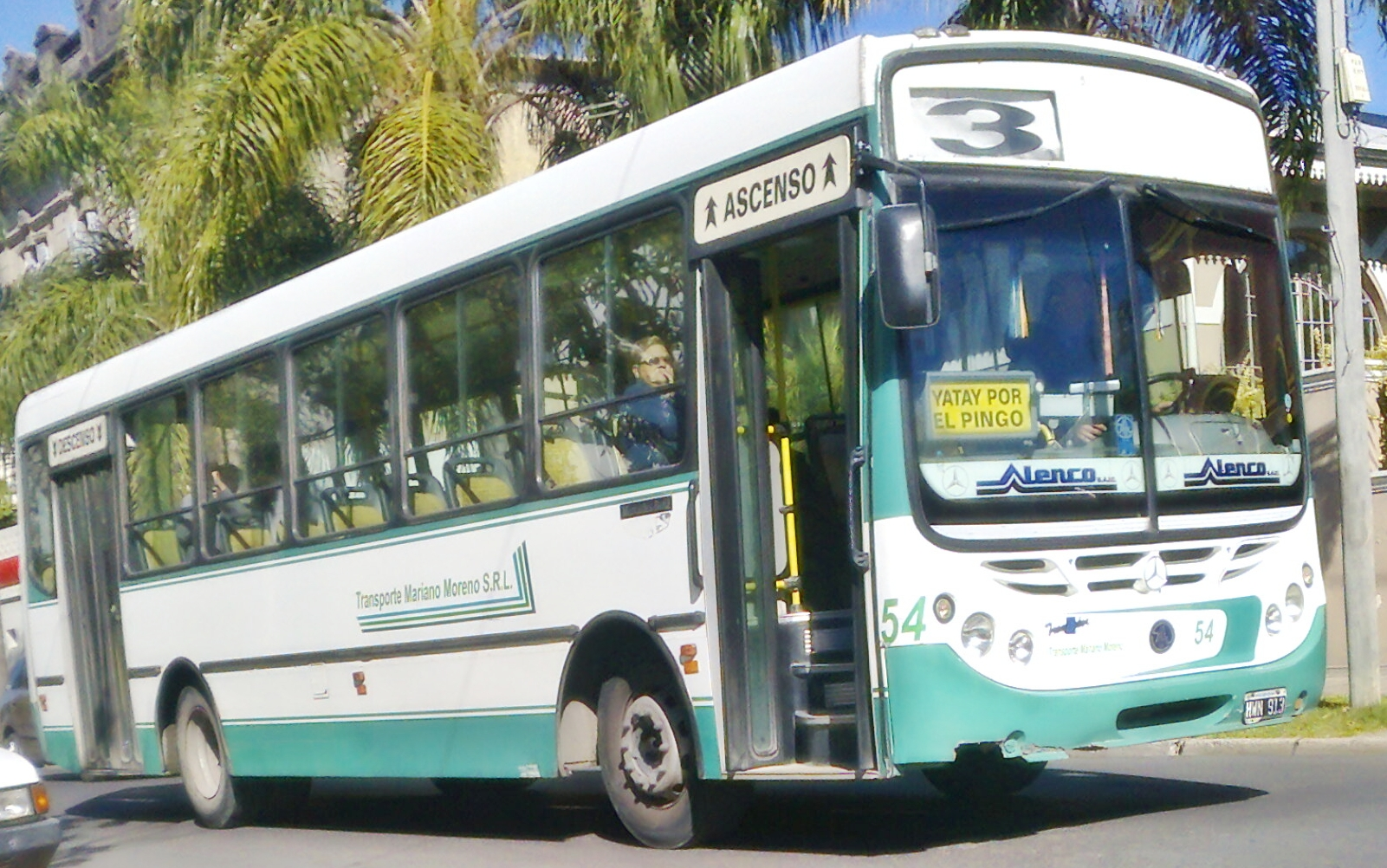 Interno 54 de la empresa Transporte Mariano Moreno S.R.L. brindando servicio para la línea 3, de la ciudad de Paraná, Entre Ríos, Argentina. Carrocería Metalpar Tronador I, motor Mercedez Benz OF1418. ColectivosEntreRios.